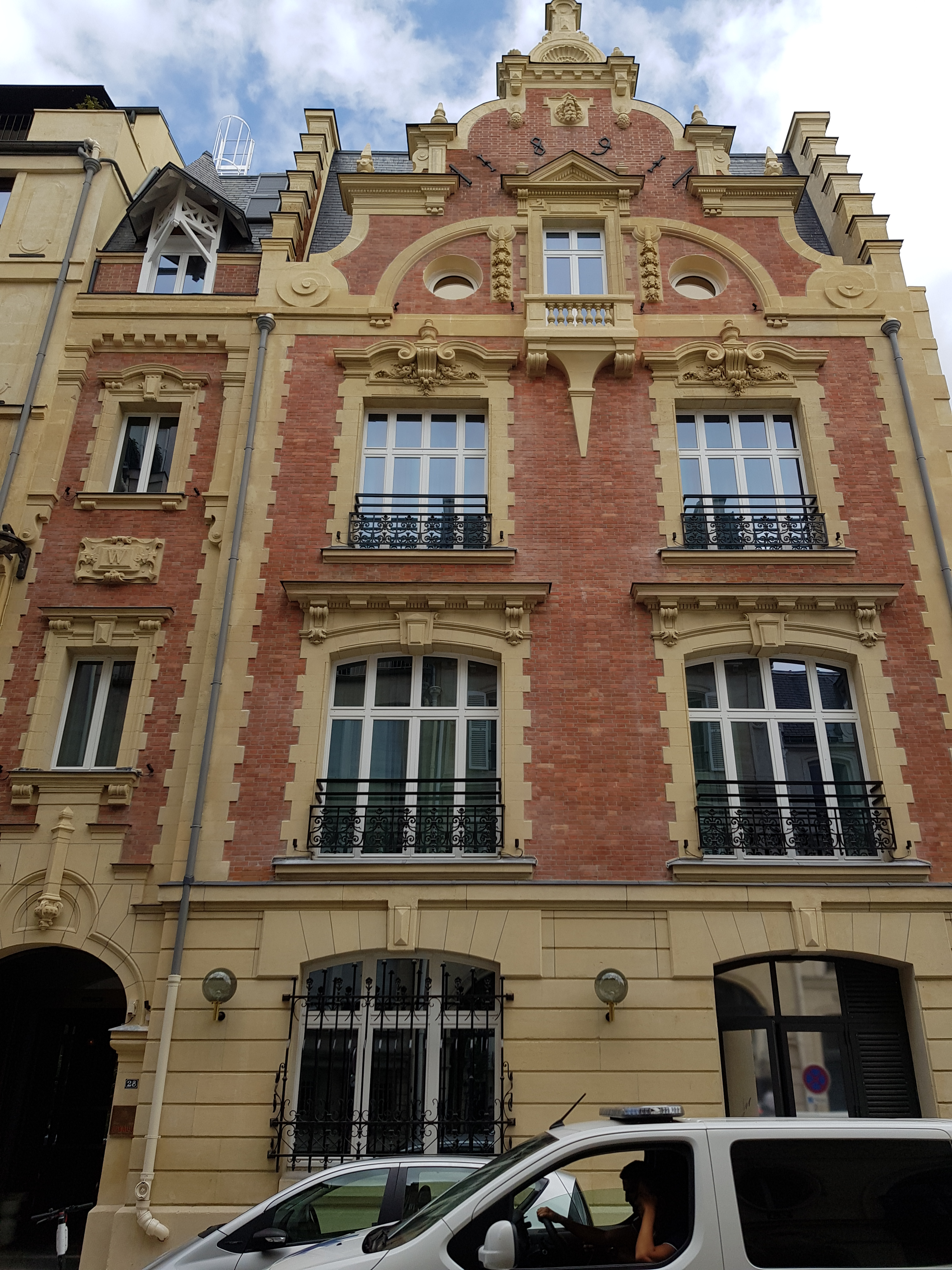 28, rue Ballu, Paris 9e.